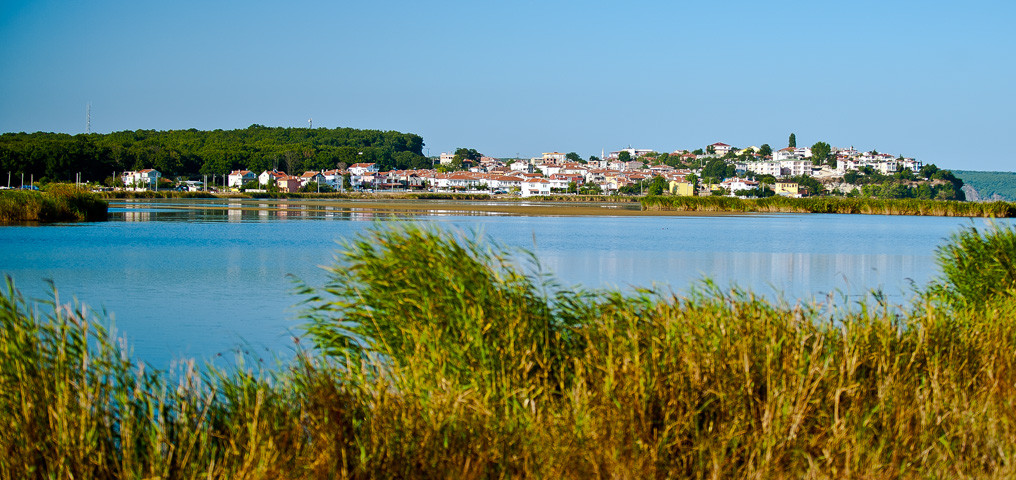 Longozlardan İğneada'nın görüntüsü